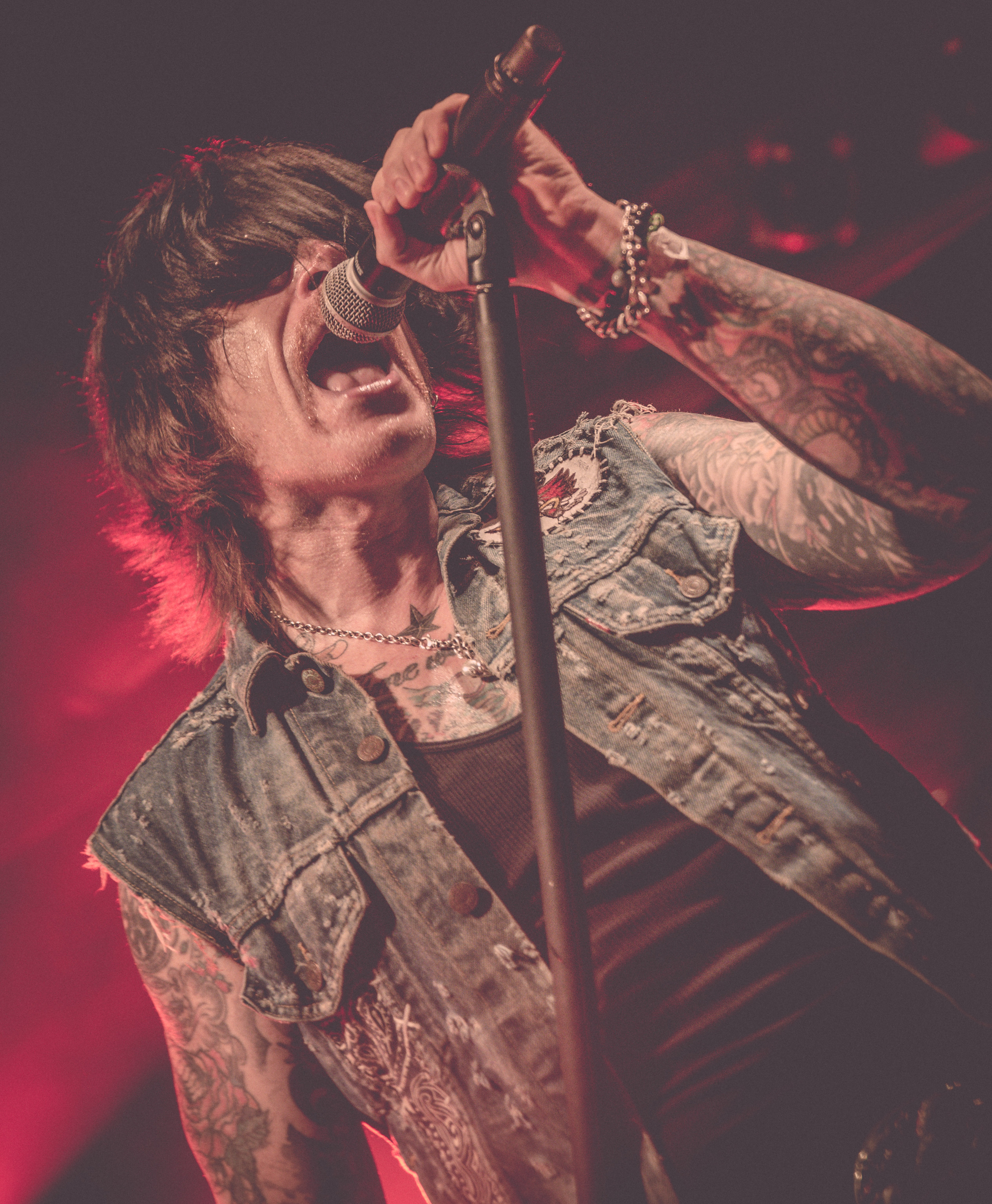 de